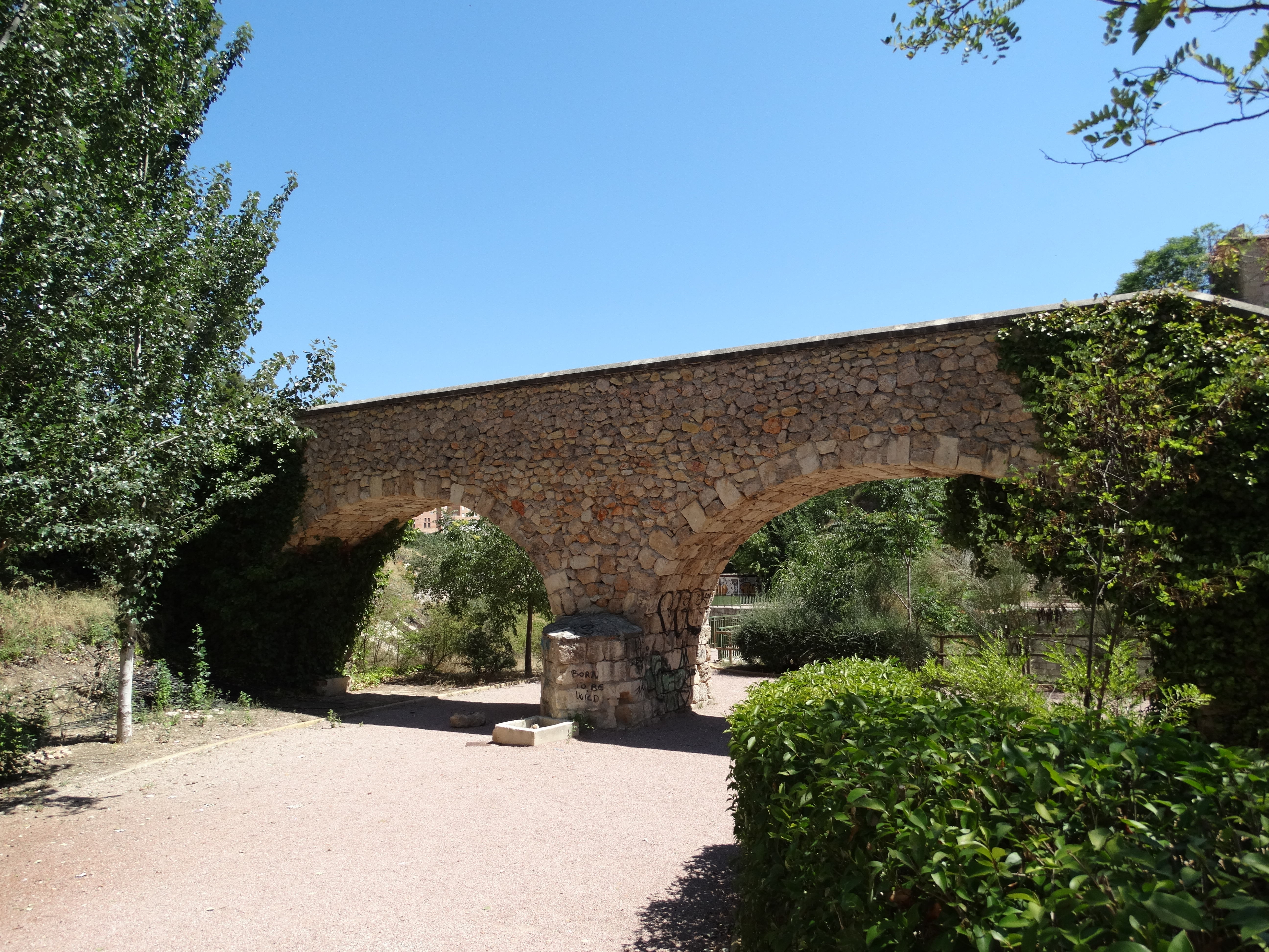 Puente Huerta Mayor del Huerto de Llácer o Palomino. 2ª mitad del siglo XVIII